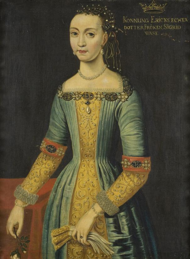 Sigrid Eriksdotter Vasa (1556-1633)